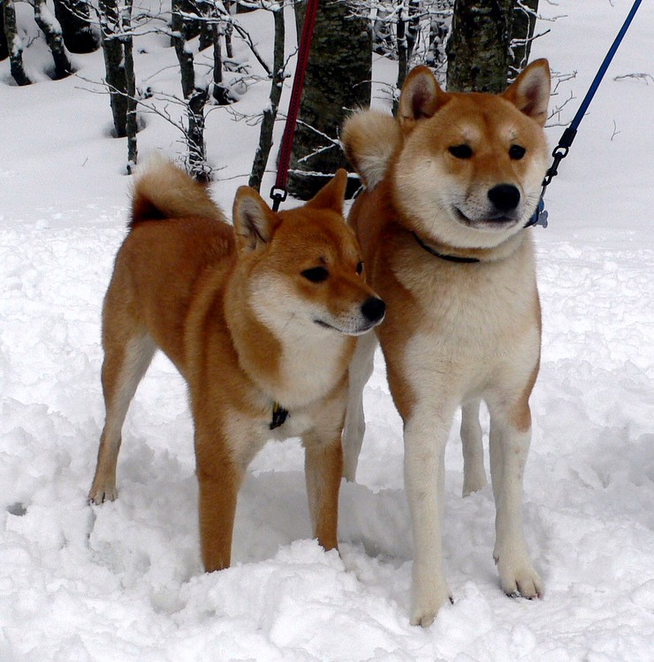 Tomada en el Montsney, Barcelona, Spain